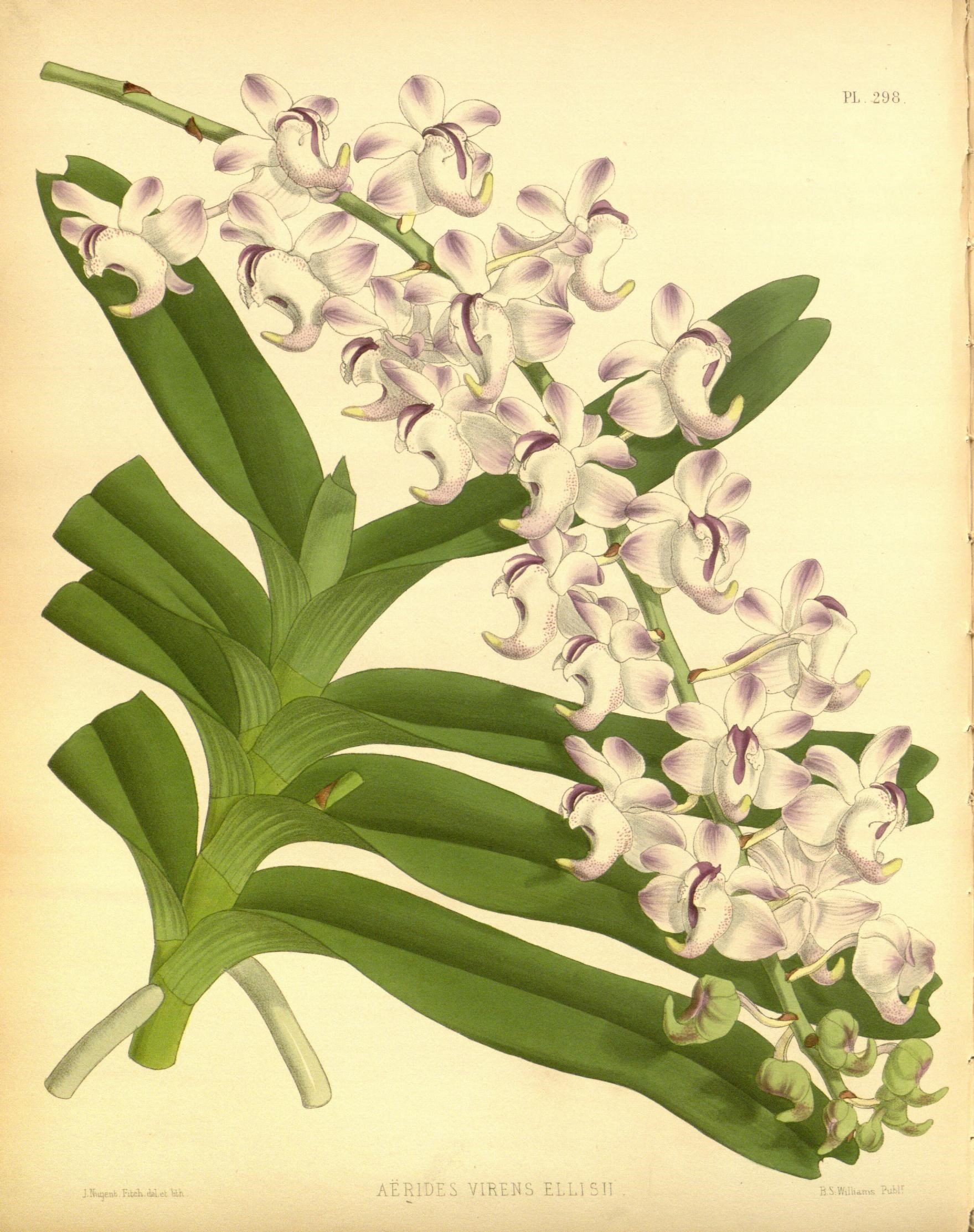 298 I -^r I, 4 I Si I 1 A .4 . 1 .' 1 ^ AERT'^^ YIKENS ELLISII b. V ■i